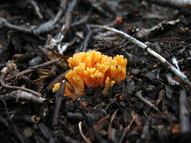 Imagen de Ramaria flava o changle